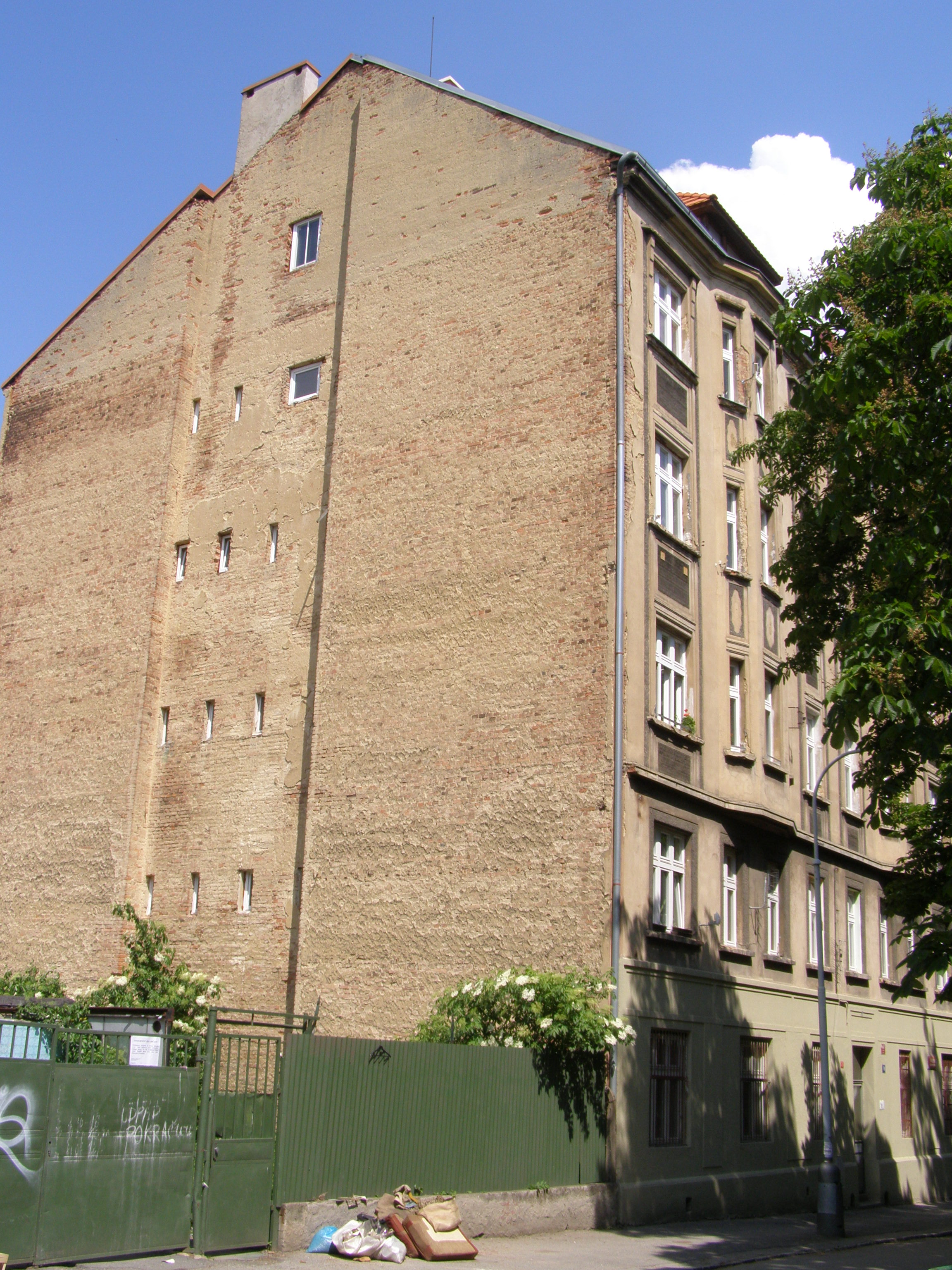 Praha, Břevnov, ulice Radimova, čp. 8 ("Břevnovský mrakodrap")